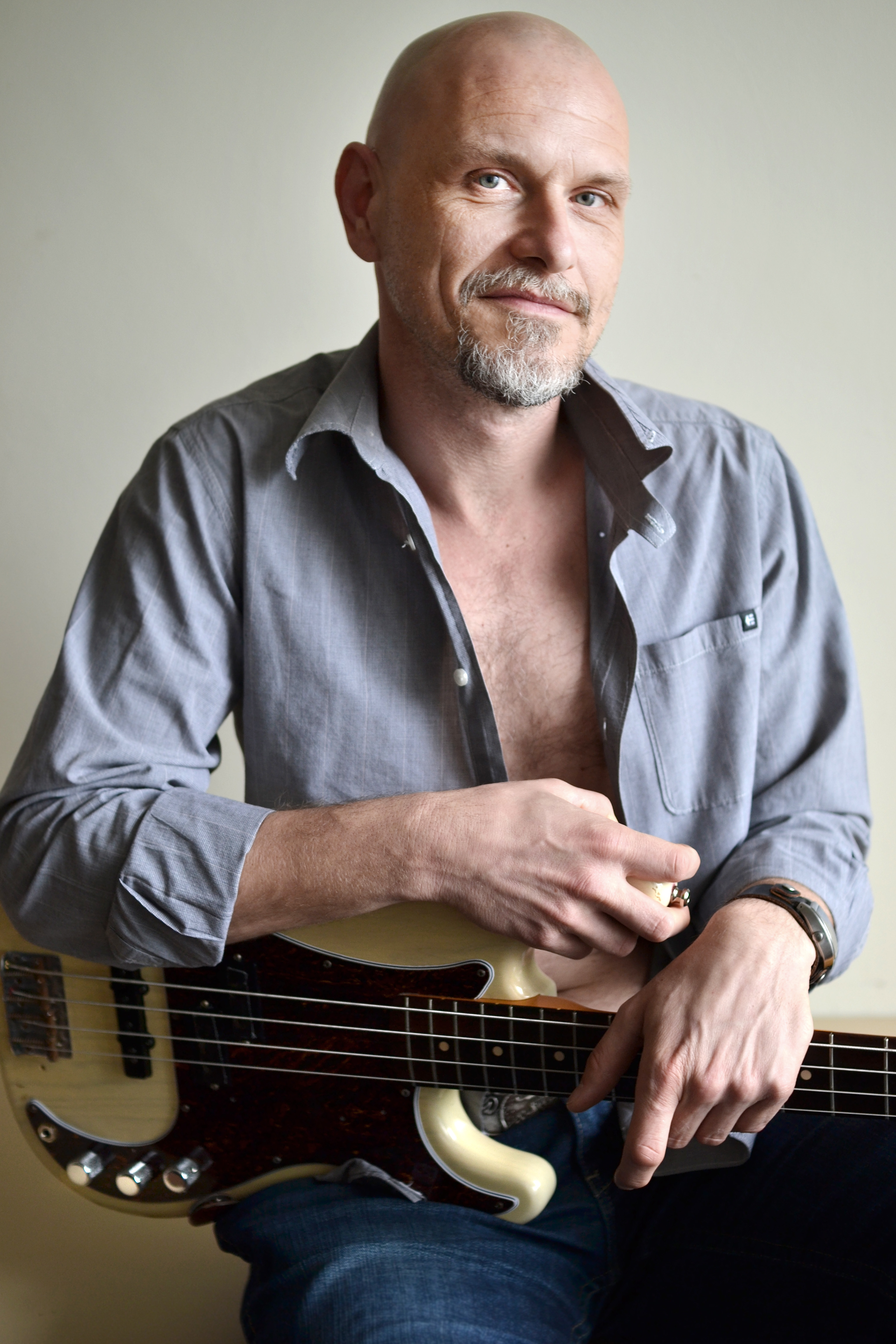 Axl Peleman, Belgisch muzikant, zanger en bassist.